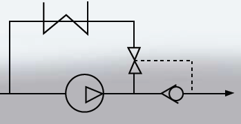 schemat obrazujący metodę regulacji sprężarki wyporowej za pomocą przewodu obejściowgo